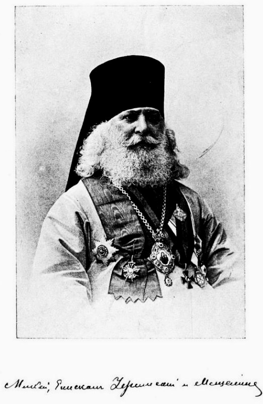 Епископ Уфимский и Мензелинский Михей (М.Ф.Алексеев) (1851 - 1931).